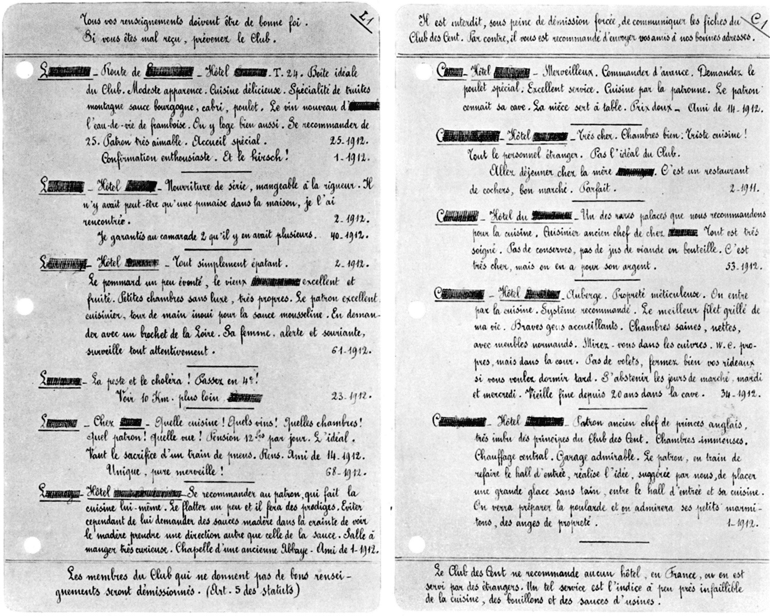 "Deux des feuillets mobiles du répertoire secret du Club des Cent. Résumées au siège social et datées, les fiches fournies par les membres du Club, et signées de leur numéro d'inscription, sont transcrites sur ces feuillets. Ceux-ci sont envoyés aux membres du Club, qui les insèrent, à leur place alphabétique, dans leur répertoire individuel."